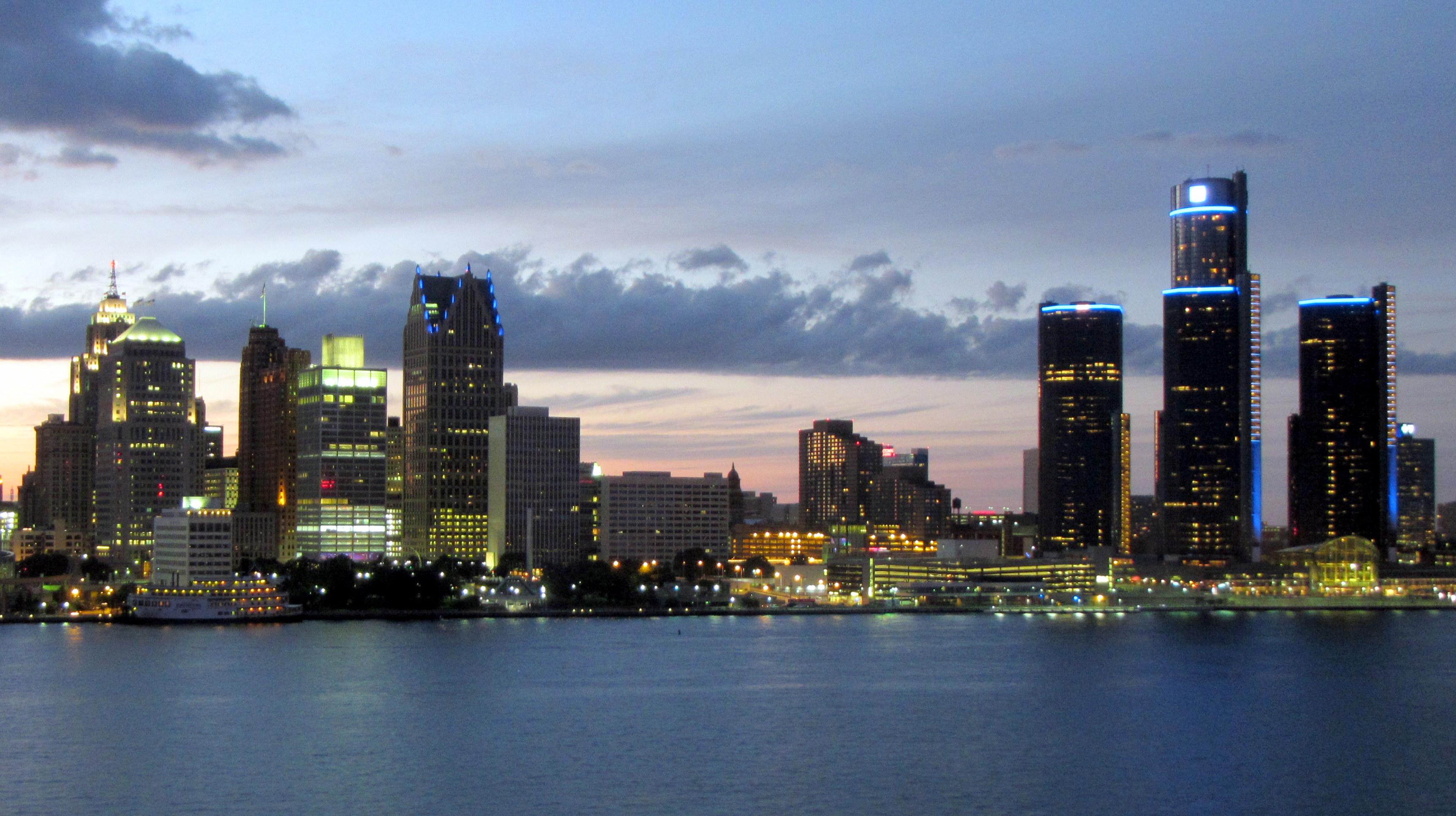 Detroit Skyline from Windsor - L'horizon de Detroit la nuit